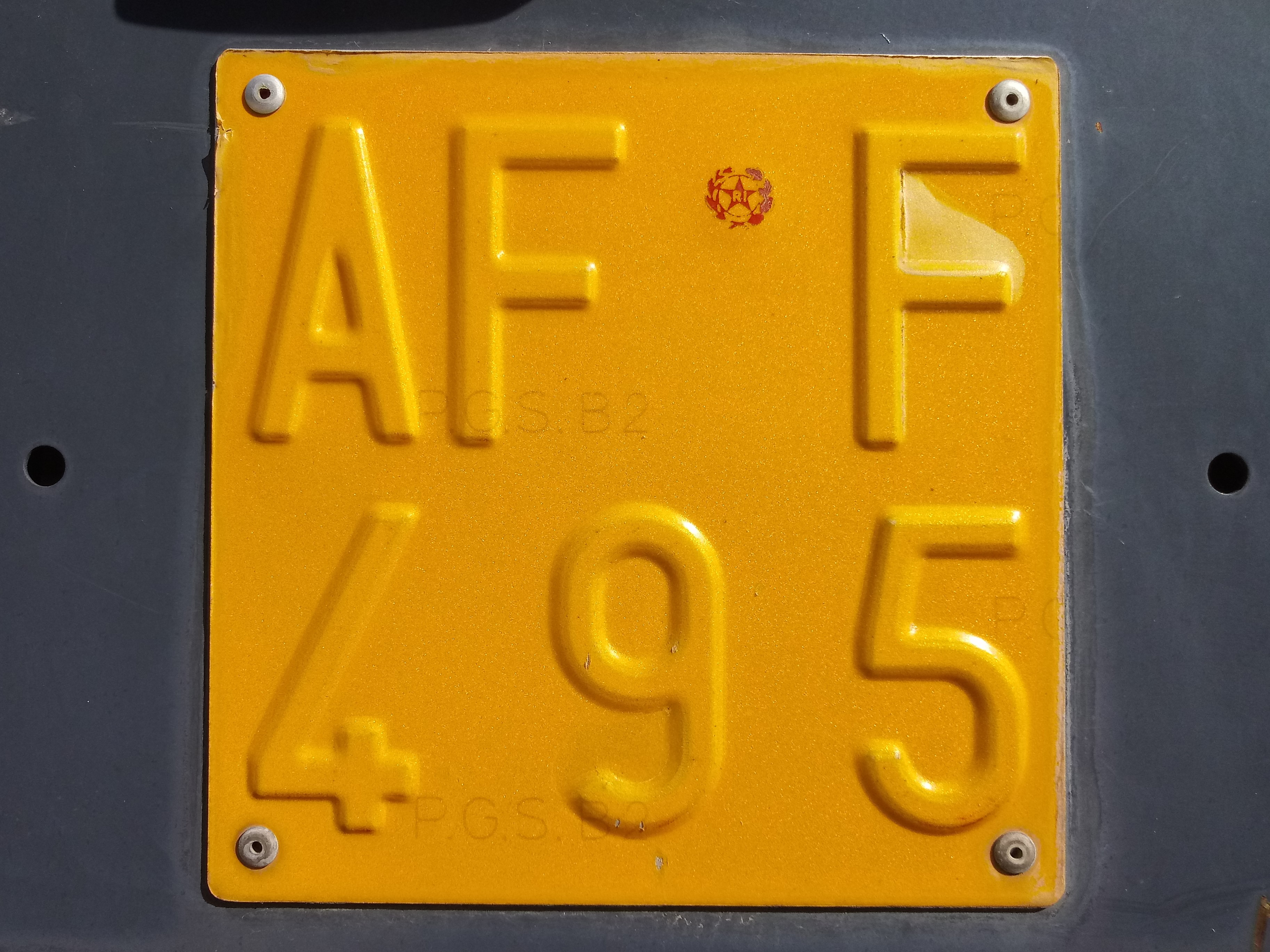 L'immagine rappresenta la targa (con caratteri gialli su fondo giallo) di una macchina da cantiere, con tre lettere in alto e tre cifre in basso. Luogo: Francolini (frazione di Folgaria, provincia di Trento)